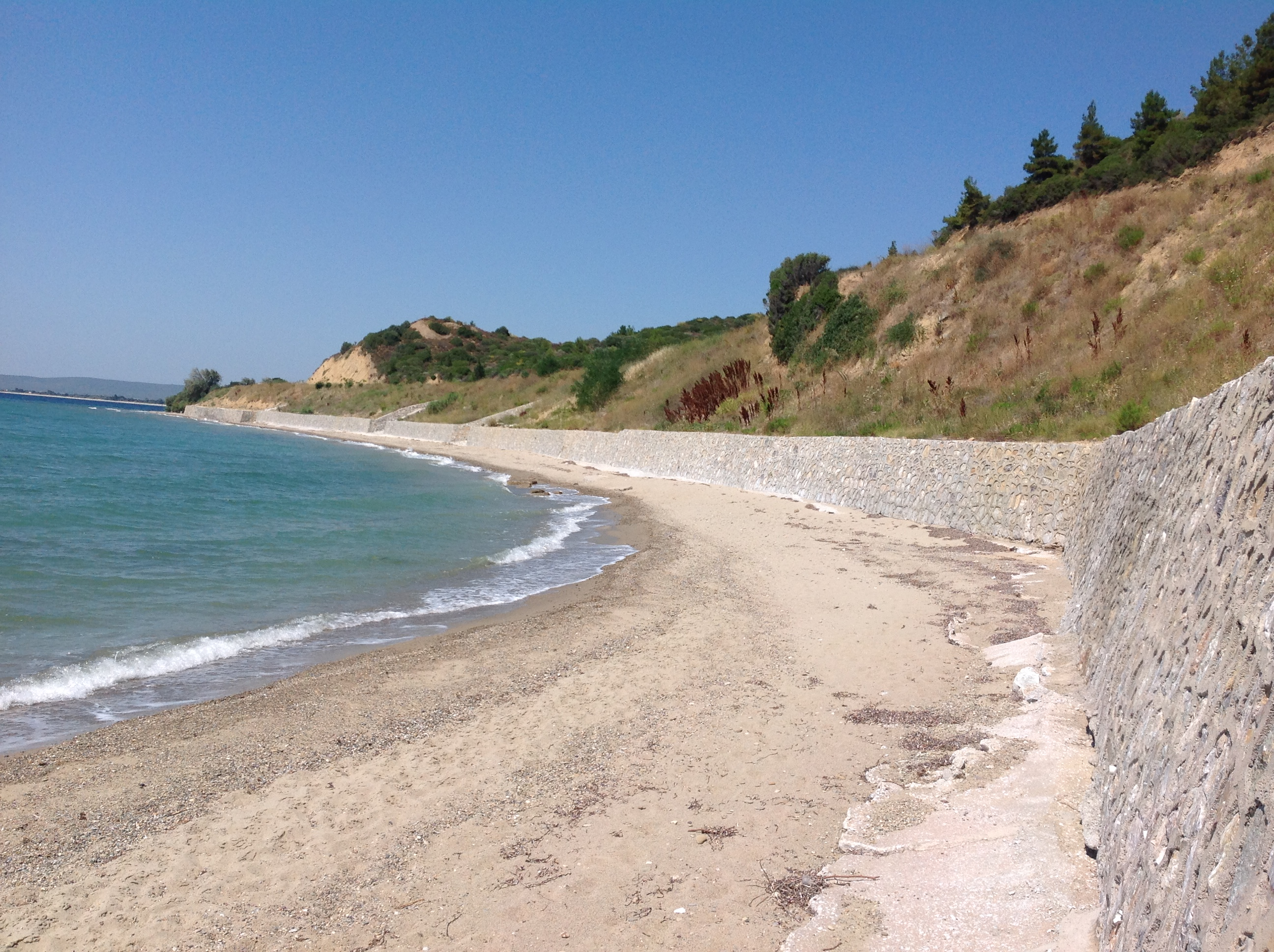 1915 te çekilen fotoğrafın aynı kadrajından tekrar çekilmiştir.